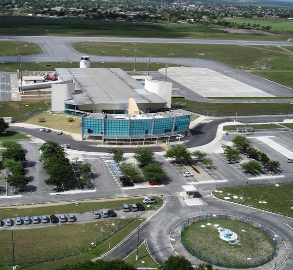 Aeroporto castro pinto em joao pessoa